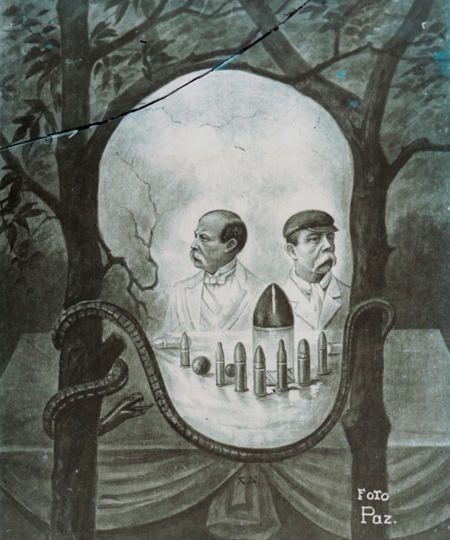 Grabado sobre la tiranía del licenciado Manuel Estrada Cabrera.